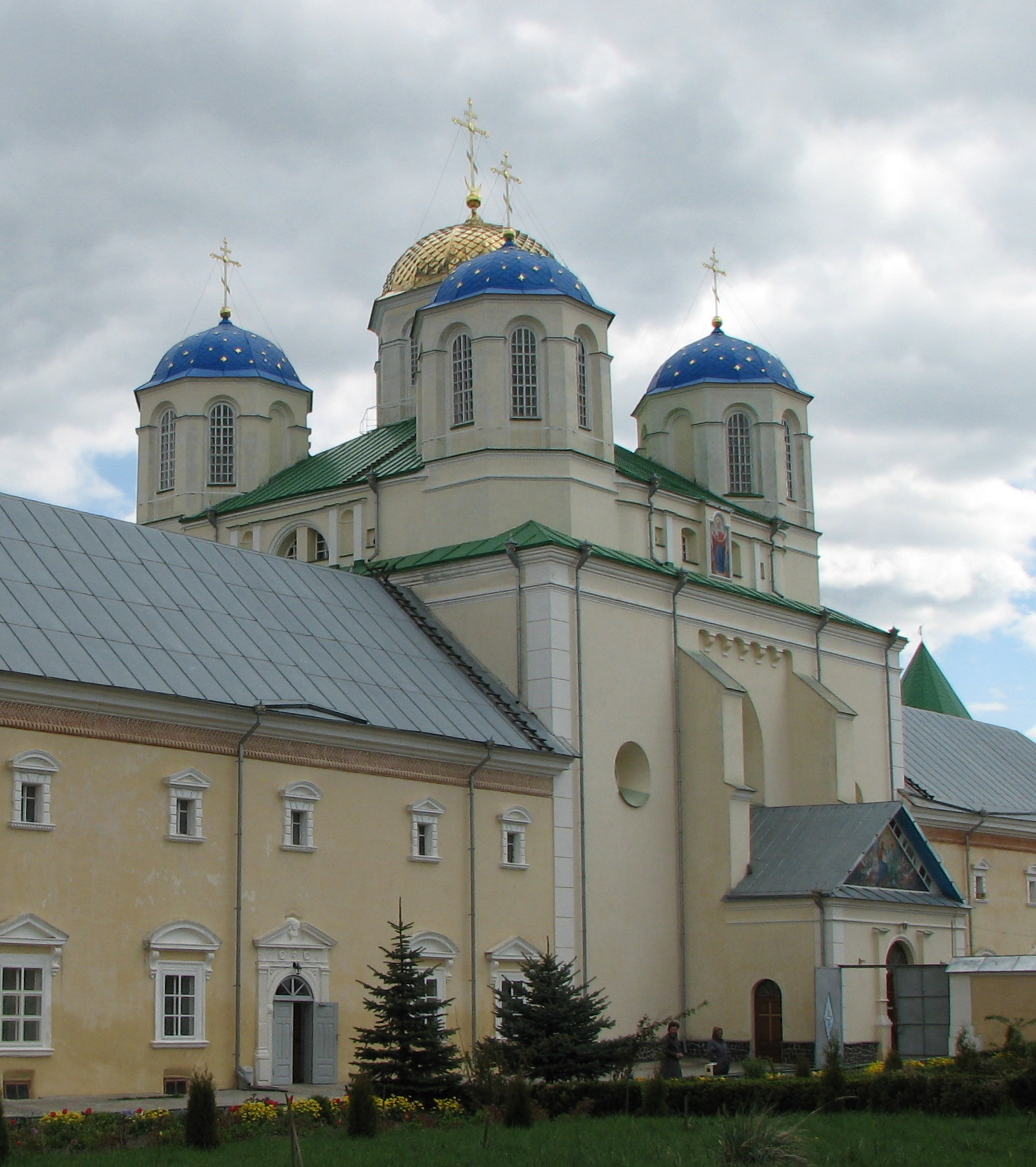 Троїцька церква Межиріцького монастиря.